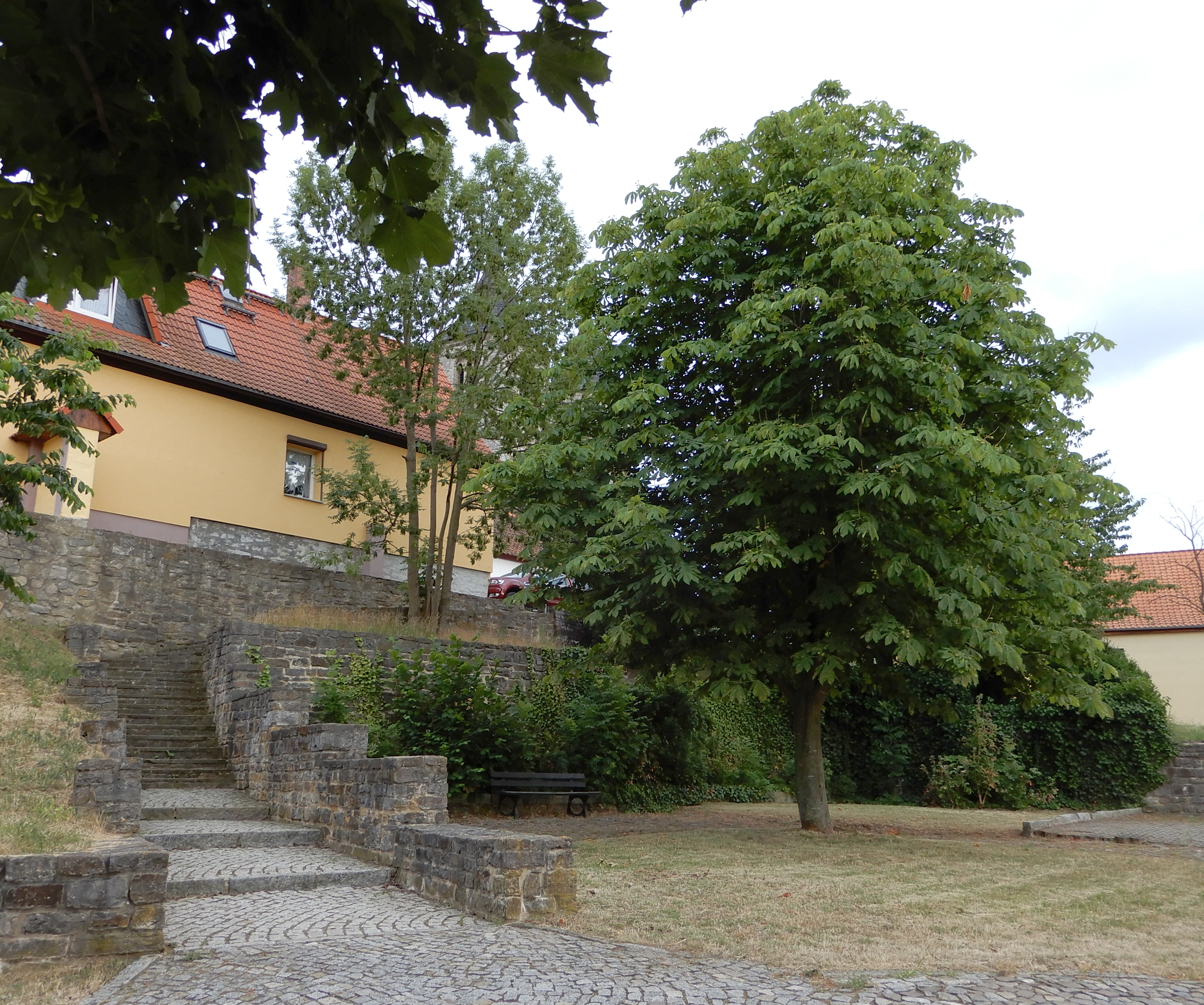 Treppenanlage am Kirchberg